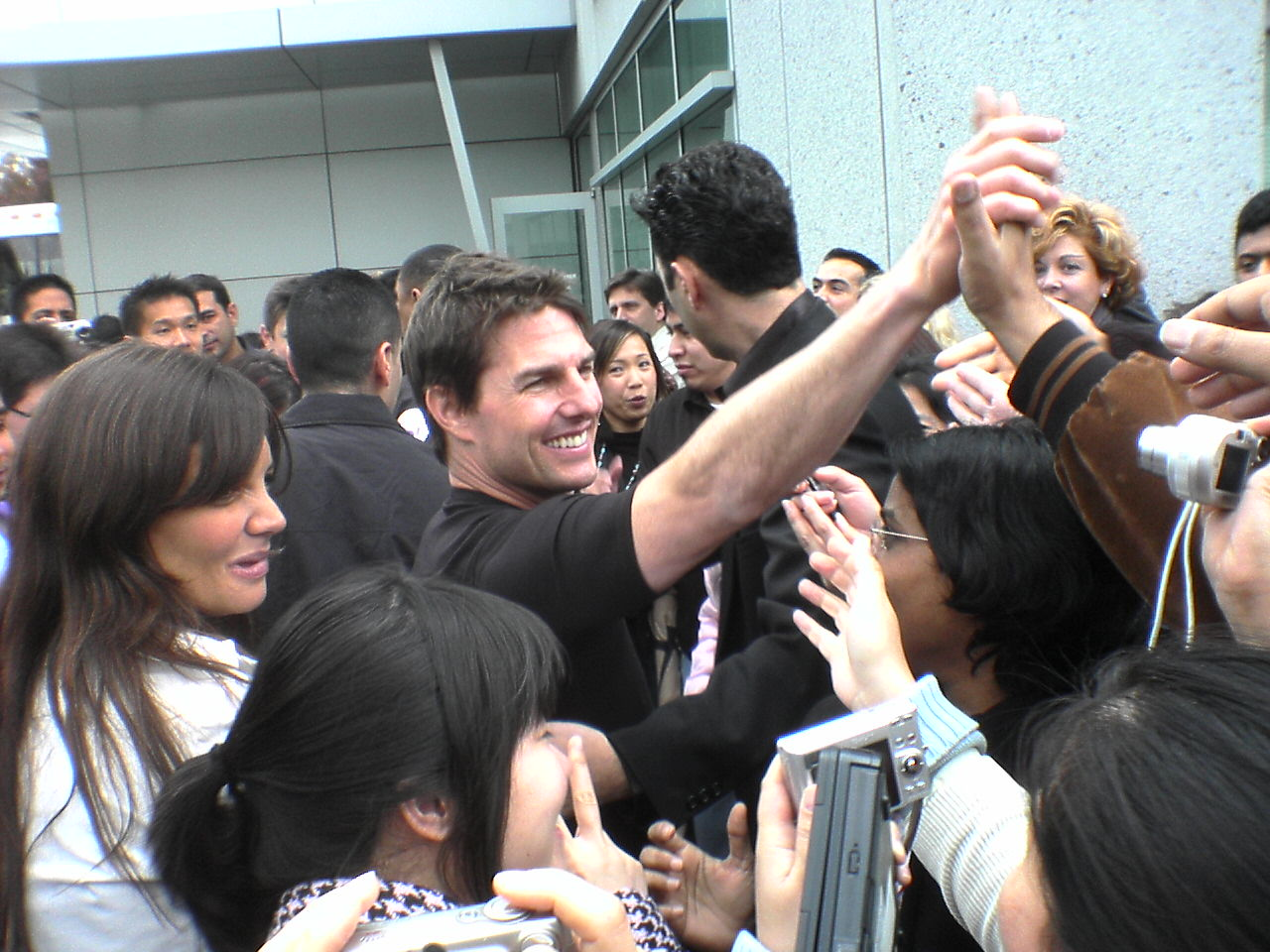 Tom Cruise and Katie Holmes in Sunnyvale, CA